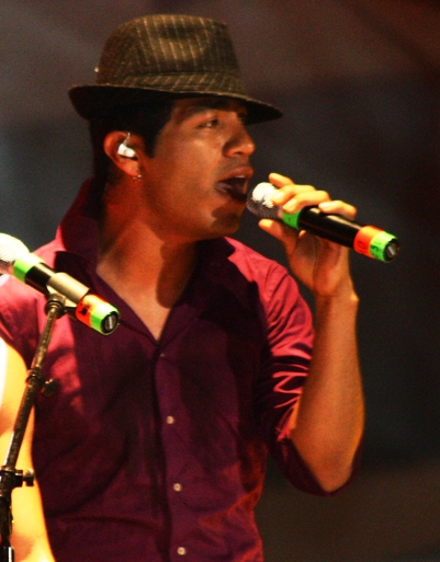 Samo durante su presentación con Camila en Managua, Nicaragua.